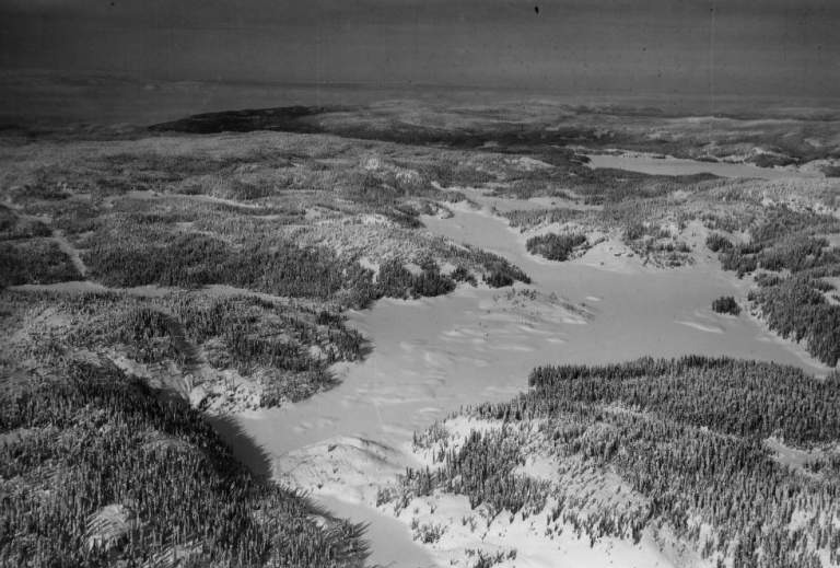 Nordre Heggelivann lake in Ringerike, Norway